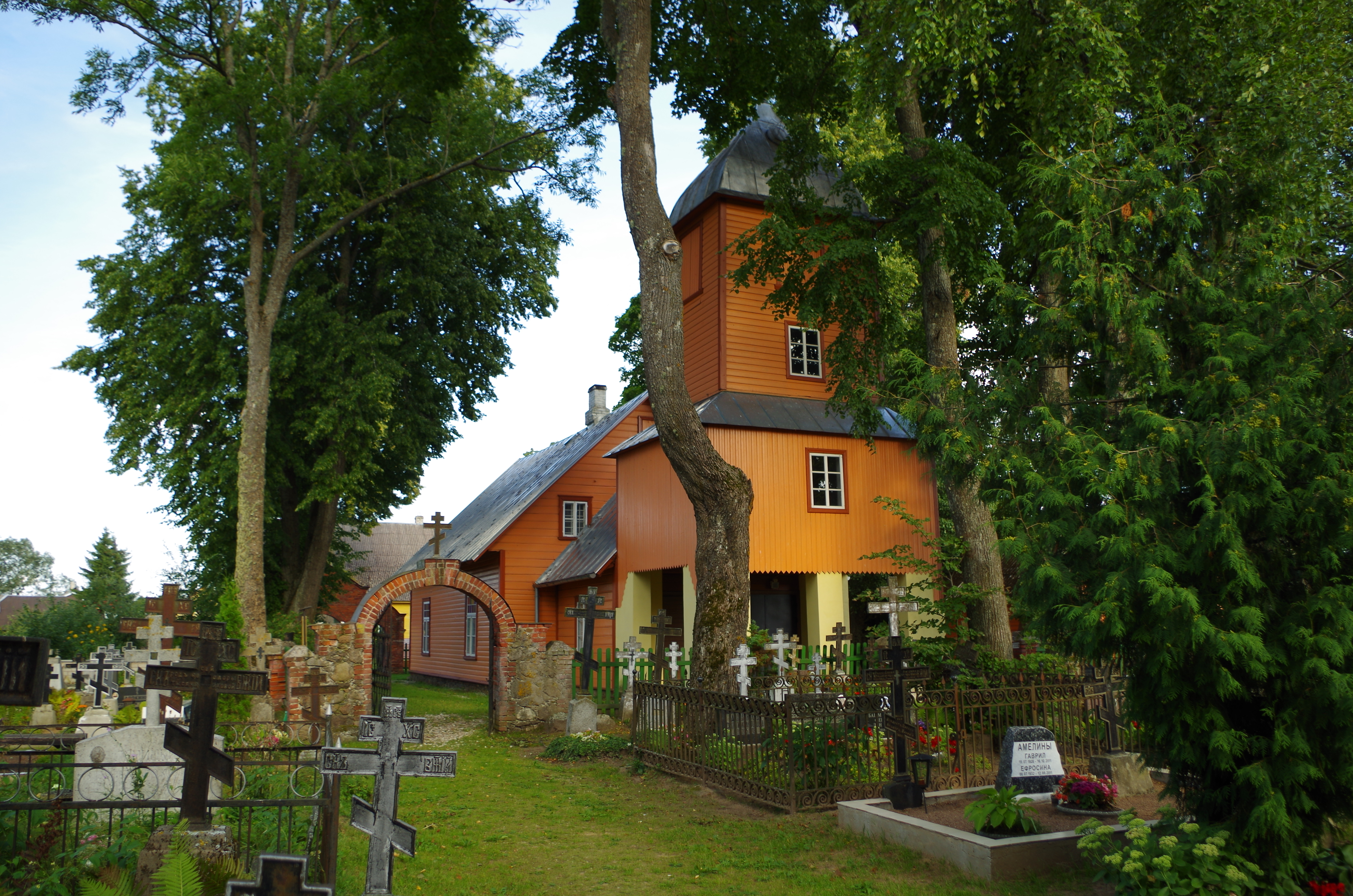 Kasepää vanausuliste palvemaja